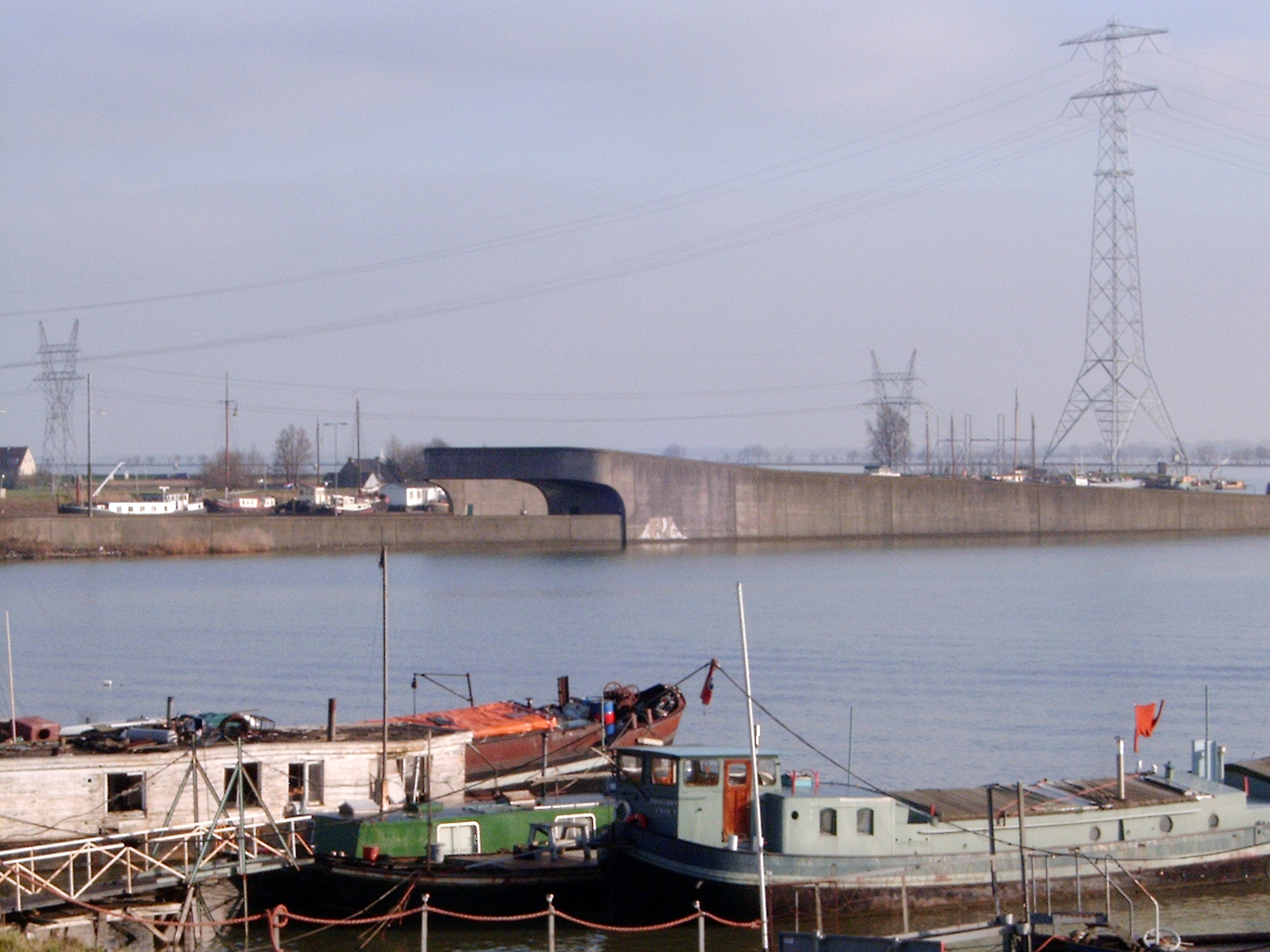 De Zeeburgertunnel